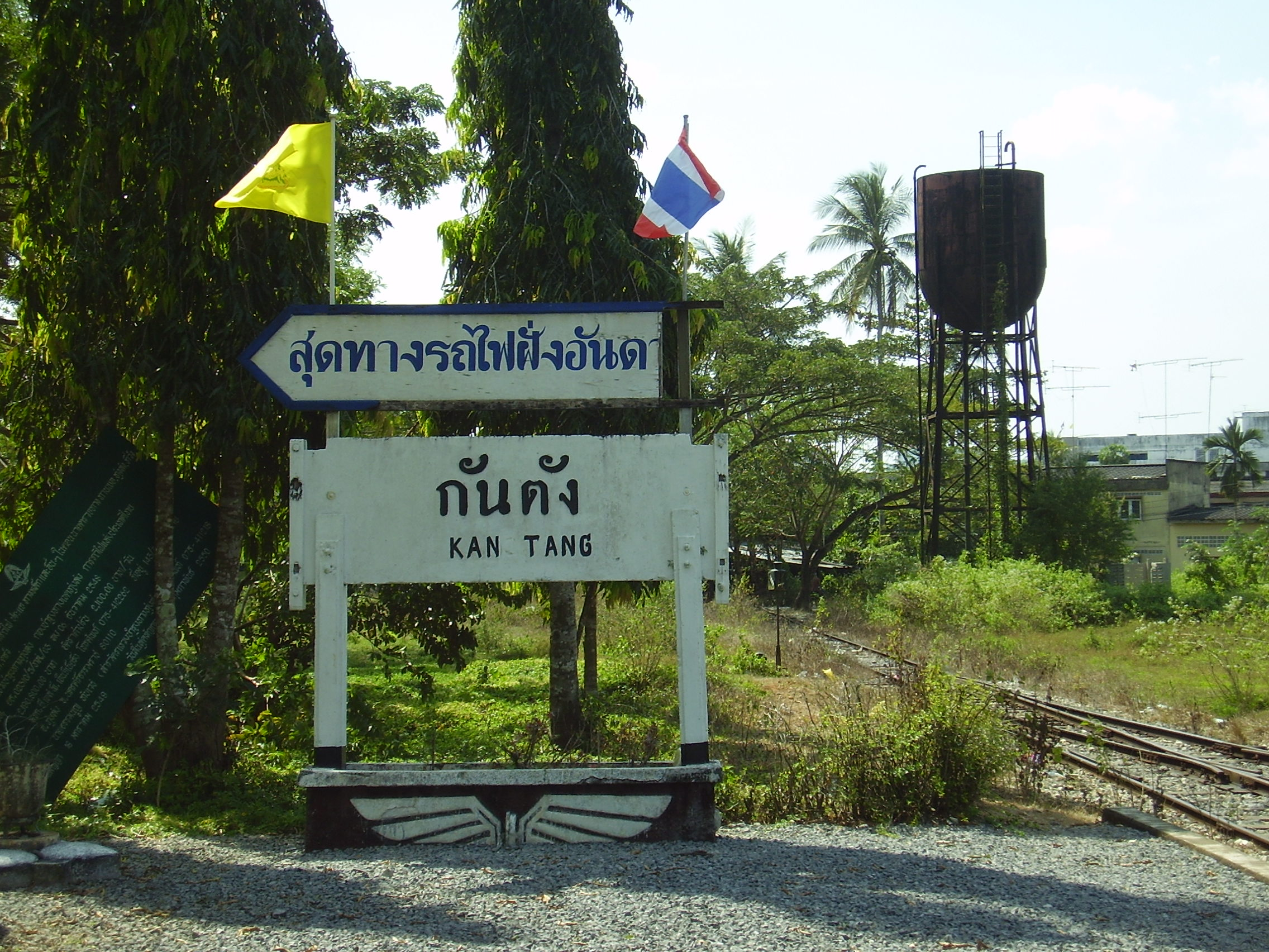 Kantang railway station